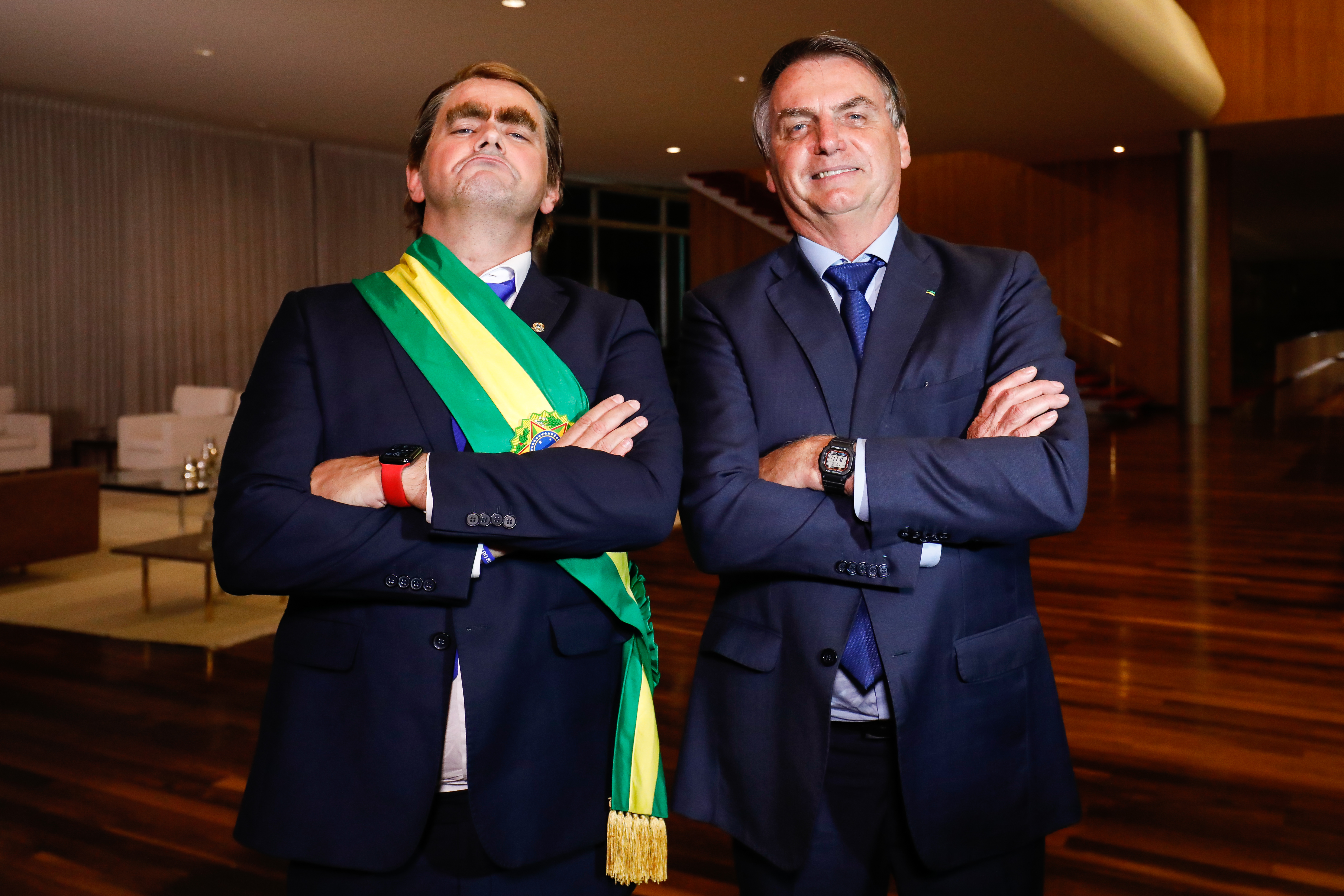 (Brasília - DF, 03/03/2020) Entrevista para o Humorista Carioca da TV Record. Foto: Alan Santos/PR